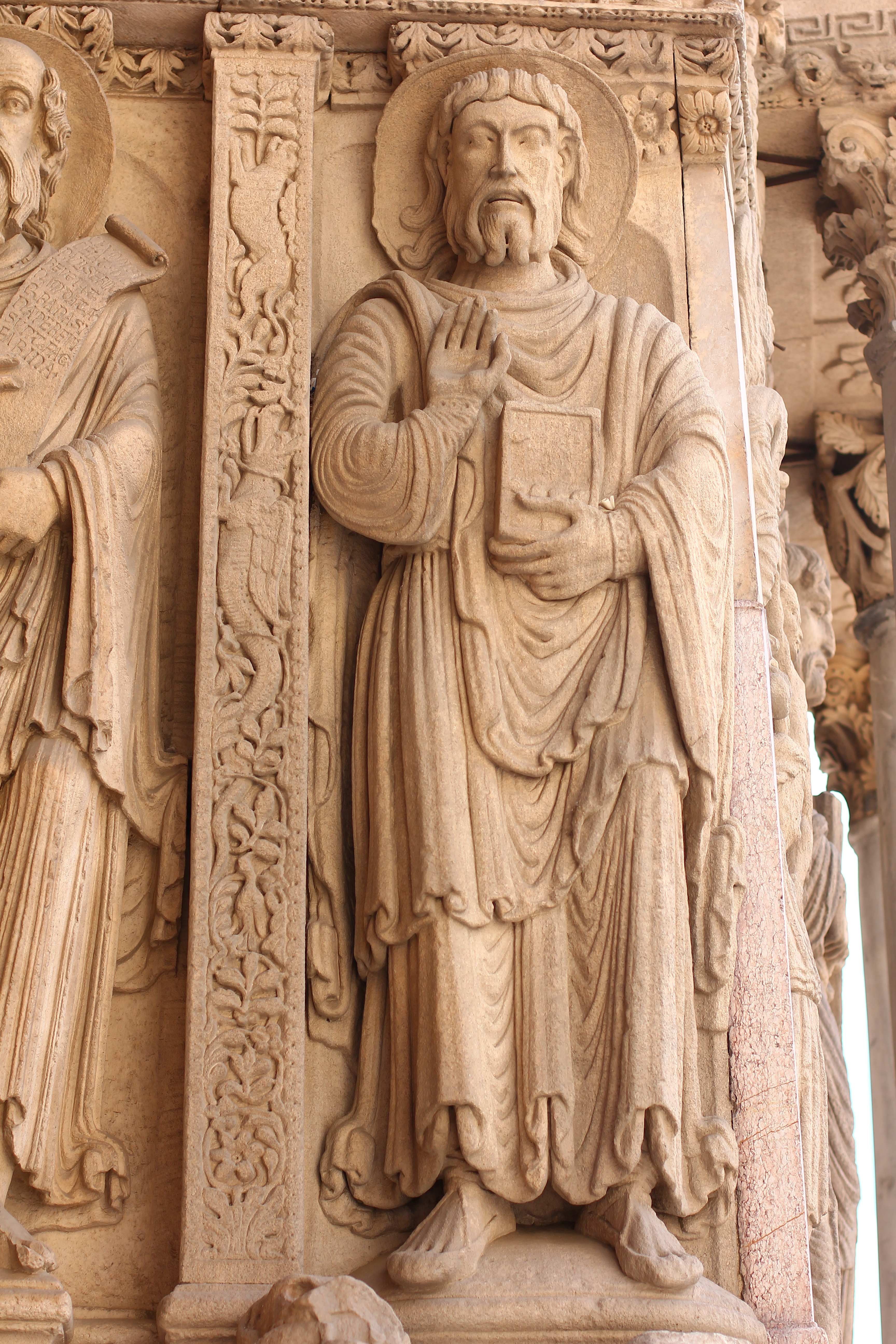 Апостол 3